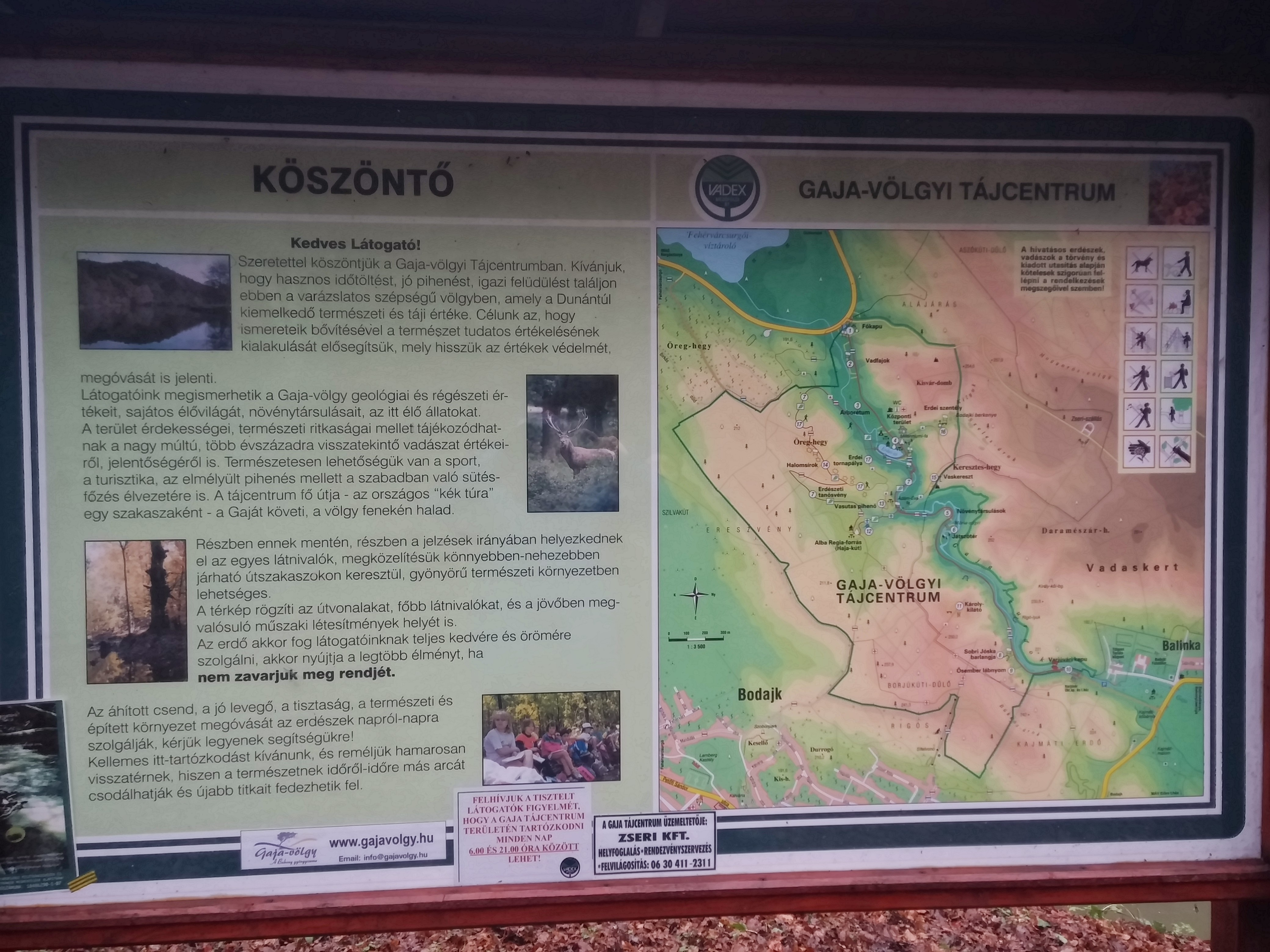 Bodajk, Hungary